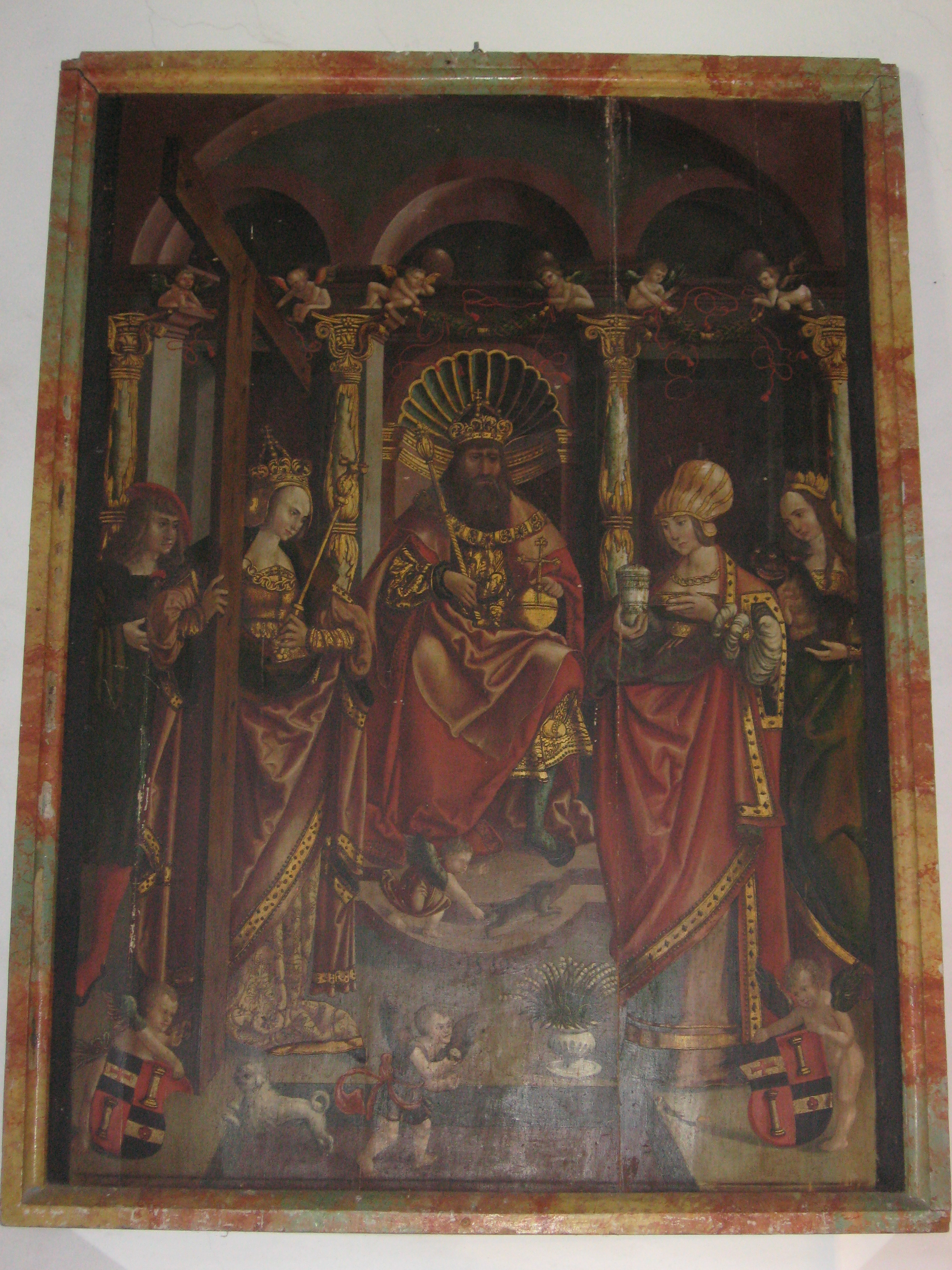 Altarbild aus St.Konstantin bei Völs - Standort: Pfarrmuseum in Völs in Südtirol